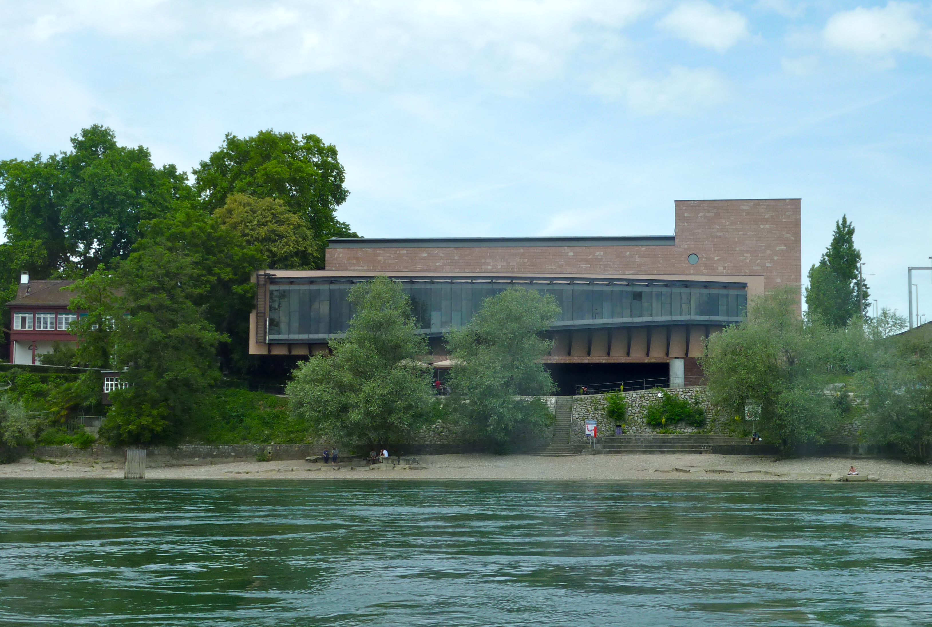 Rheinschiff Museum Tinguely bei Basel